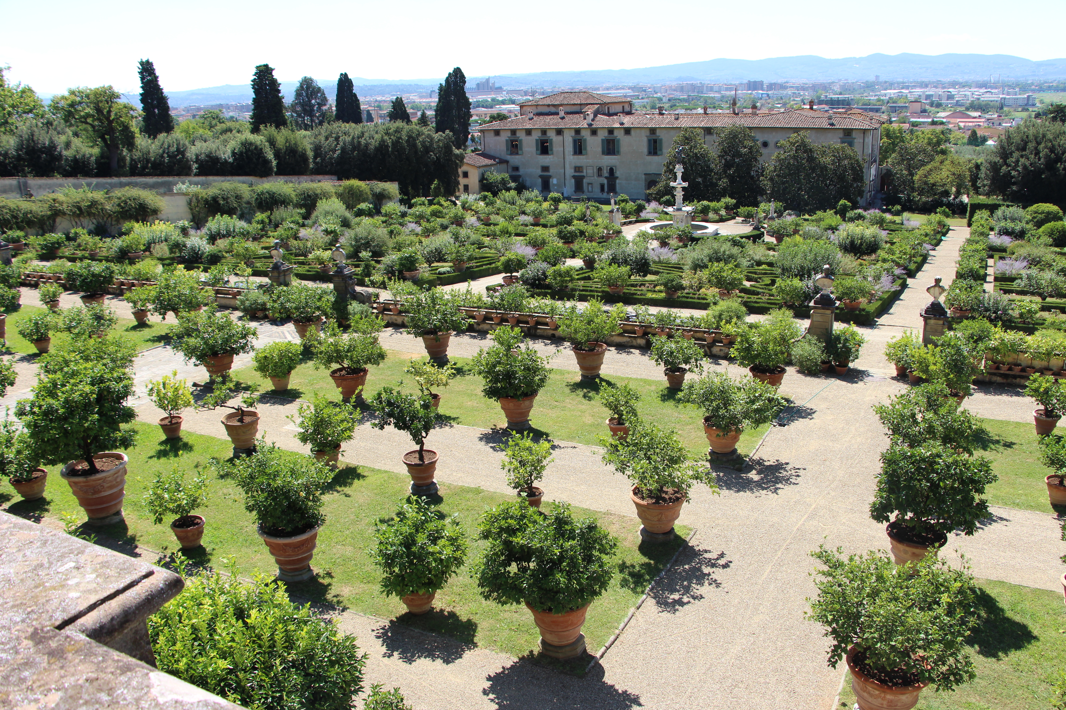 Giardino della Villa medicea di Castello - MIBAC This is a photo of a monument which is part of cultural heritage of Italy.